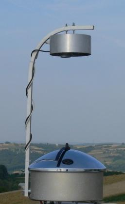 Zjęcie kamery nieba